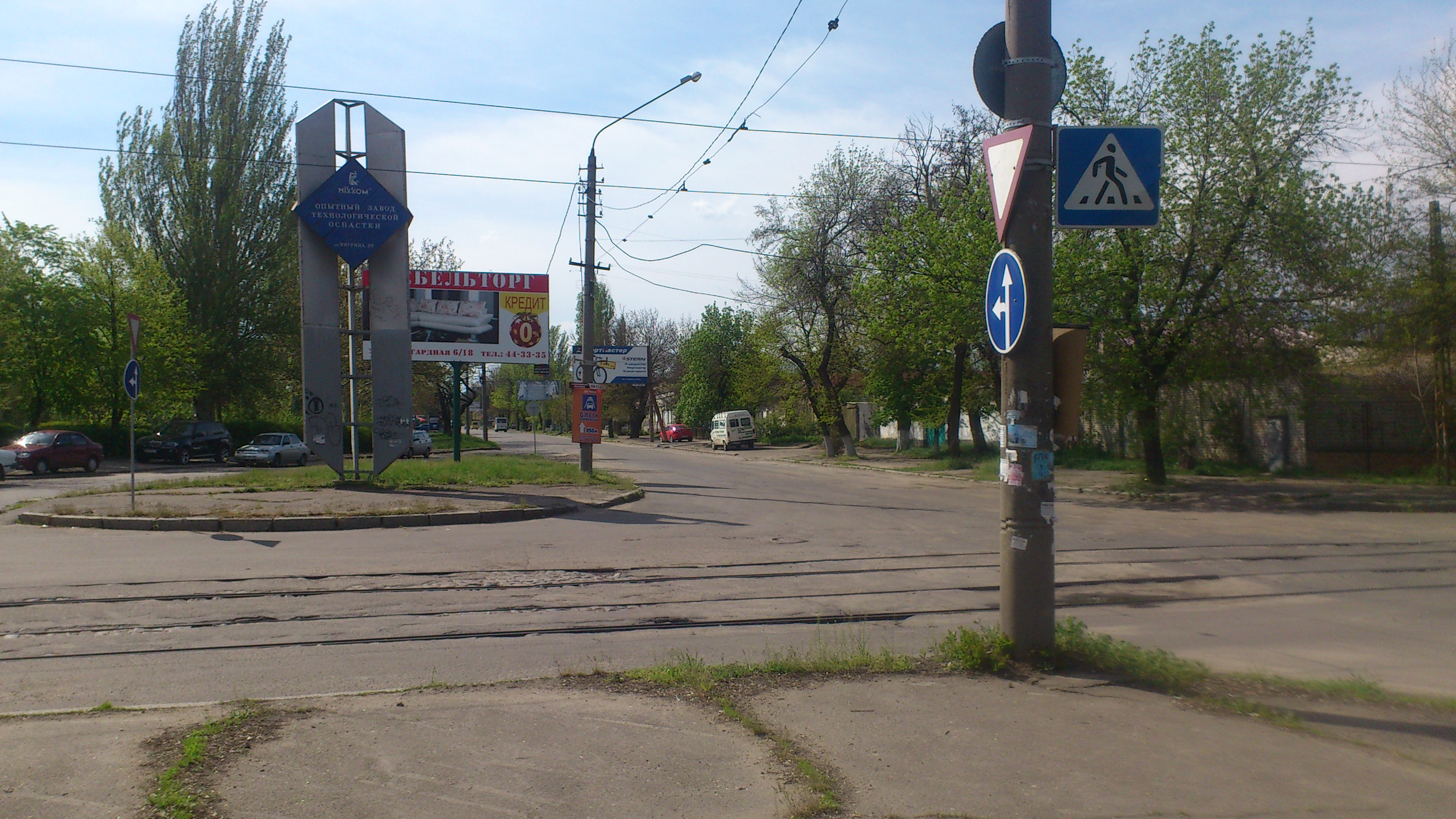 Миколаїв, вулиця Чигрина на розі з Малою морською